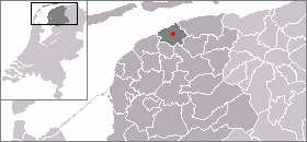 Kaart met de locatie van Ferwert (Ferwerd), gemaakt uit sjabloon van Wikipedia-gebruiker Mtcv